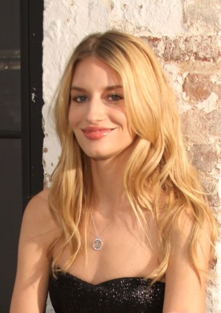 Česká modelka Linda Vojtová.